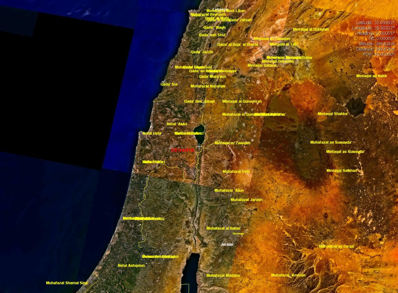 Satellittbilde - Deganya-A Fra Nasa woldwind